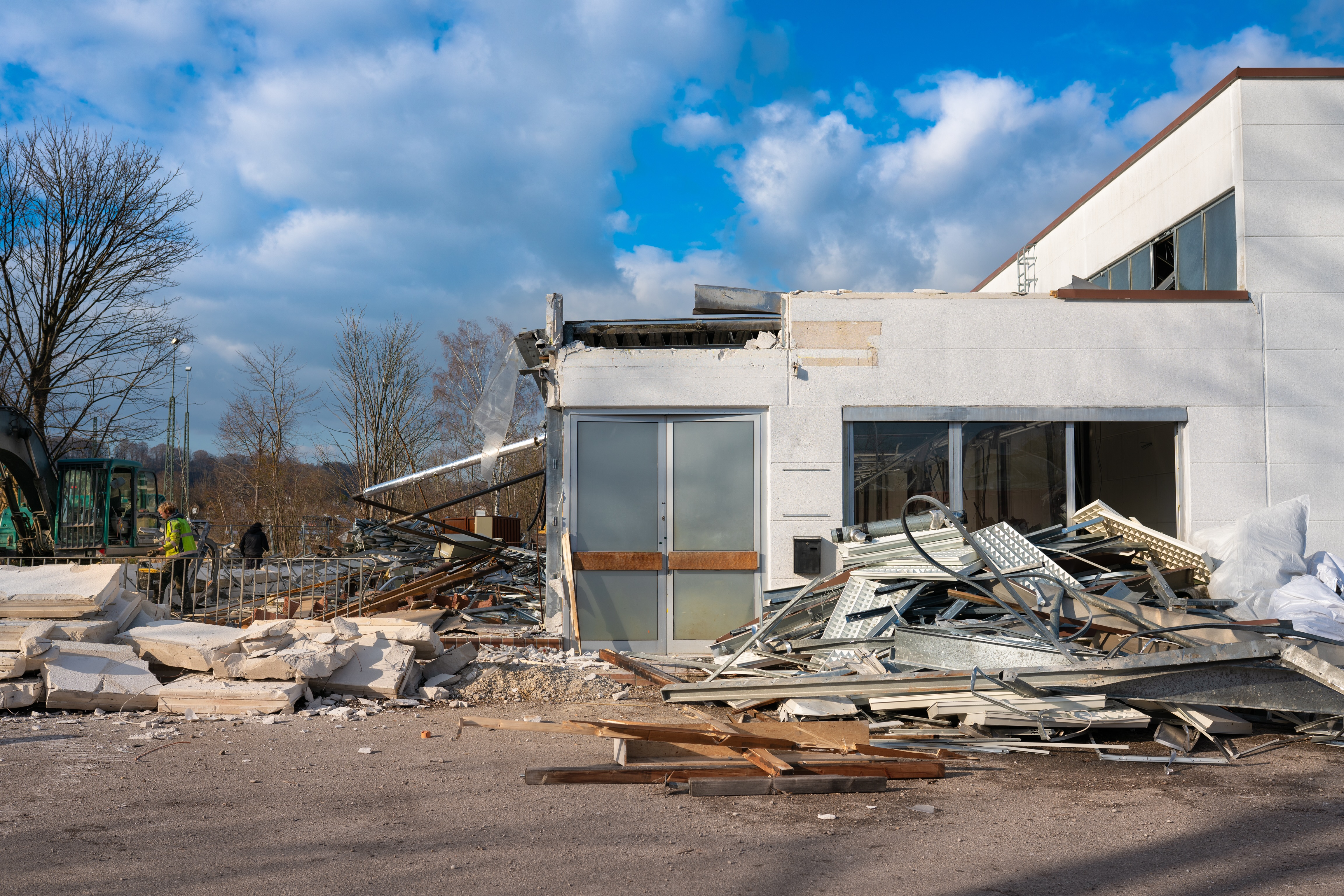 Abriss des alten Studios